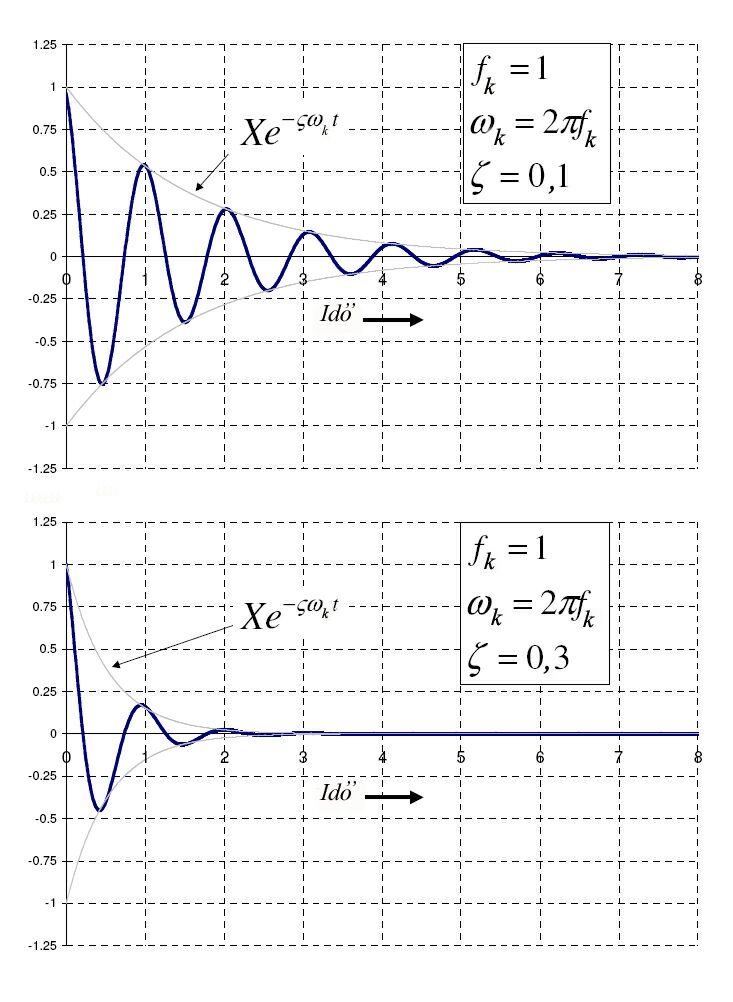 Egyszabadságfokú csillapíott lengőrendszer idődiagramja